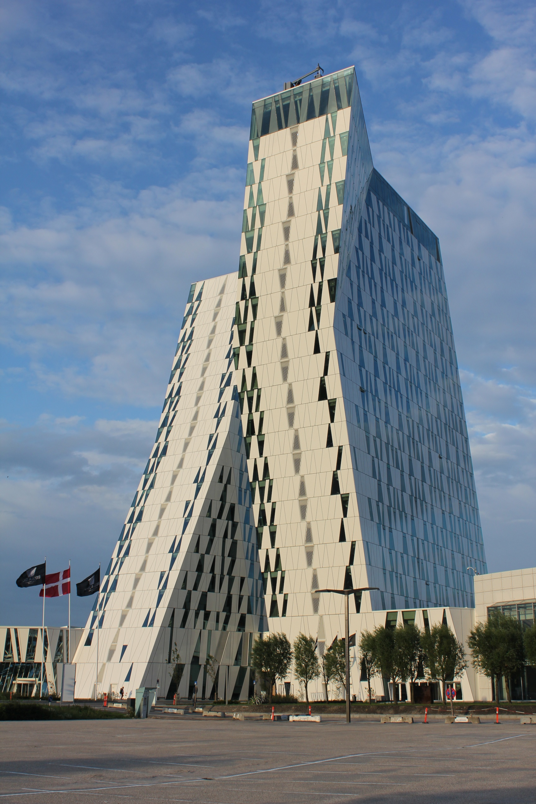 Bella Sky Hotel i København V